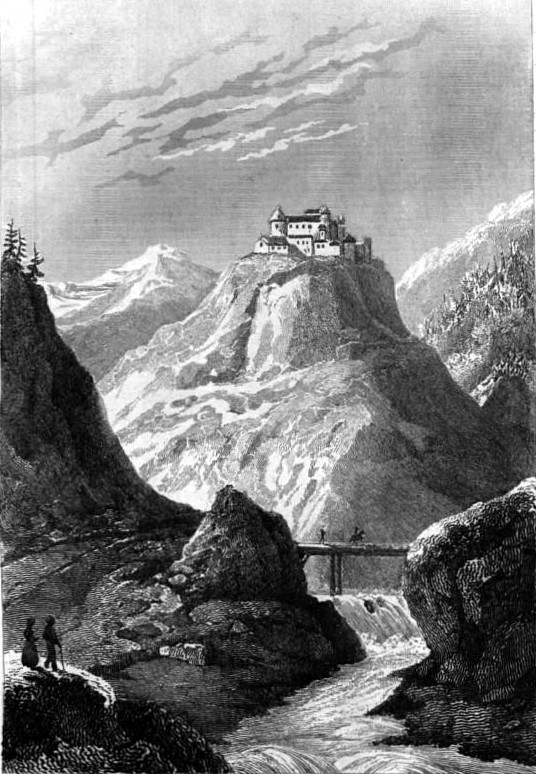 Image en provenance du livre : Eusèbe Girault de Saint-Fargeau, Guide pittoresque du voyageur en France, contenant la statistique et la description complète des quatre-vingt-six départements, orné de 740 vignettes et portraits gravés sur acier, de quatre-vingt-six cartes de départements et d'une grande carte routière de la France, par une Société de gens de lettres, de géographes et d'artistes, Paris, F. Didot frères, 1838, 6 volumes in-8° (BNF : 8-L25- 46). Volume III Didot frères, 1838. Route de Paris à Nice traversant les départements de l'Isère, des Hautes-Alpes, des Basses-Alpes et du Var. auteurs dessins : Rauch (ou autre) auteurs gravures : Skelton fils, Schroeder, Bishop (ou autre)